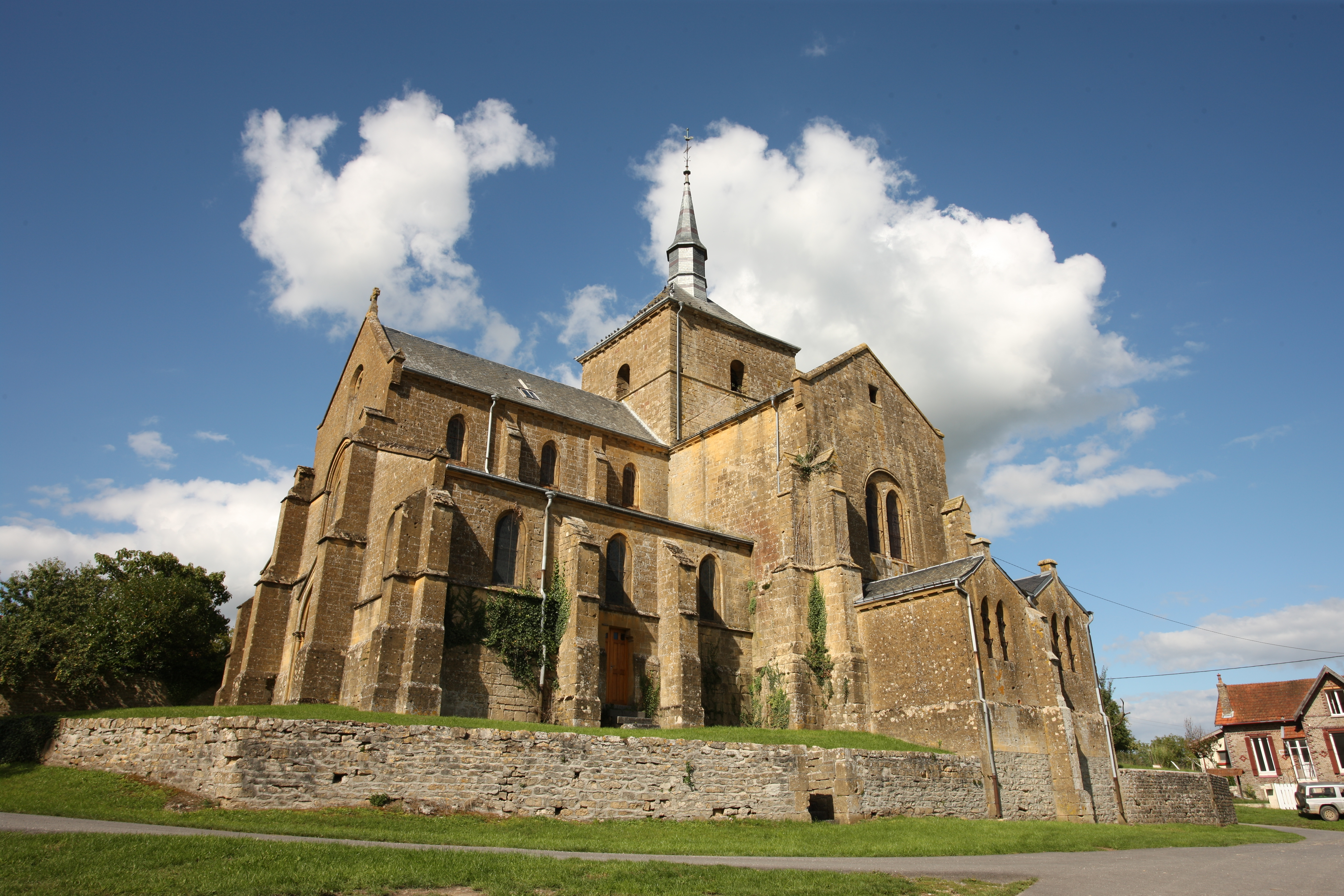 Village Ardennais